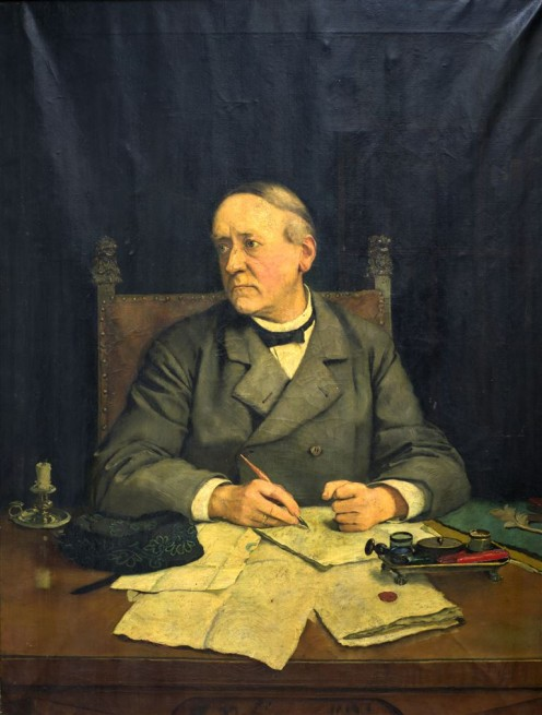 Heinrich „Harry“ Jochmus (geboren 1855 in Harburg, gestorben 1915 in Lüneburg) Porträt des Lüneburger Landrates Julius Rasch (gest. 1898).